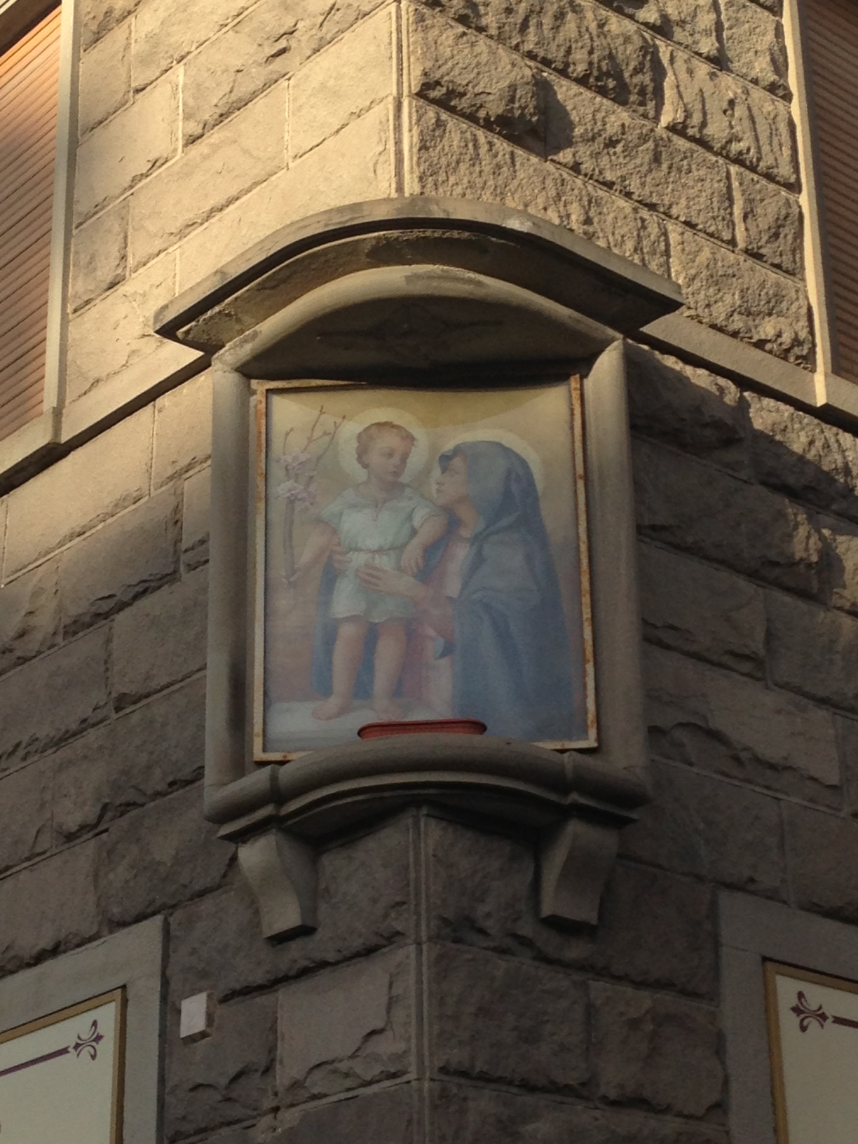 A Firenze, ad angolo tra Viale Giacomo Matteotti e Via Girolamo Benivieni si trova un tabernacolo moderno con una Madonna di Ezio Giovannozzi, grande esponente della pittura fiorentina, nato nel 1882 e morto nel 1964. Questo tabernacolo è datato 1954 ed è stato voluto dalla Società Fondiaria quando fece costruire l'edificio.